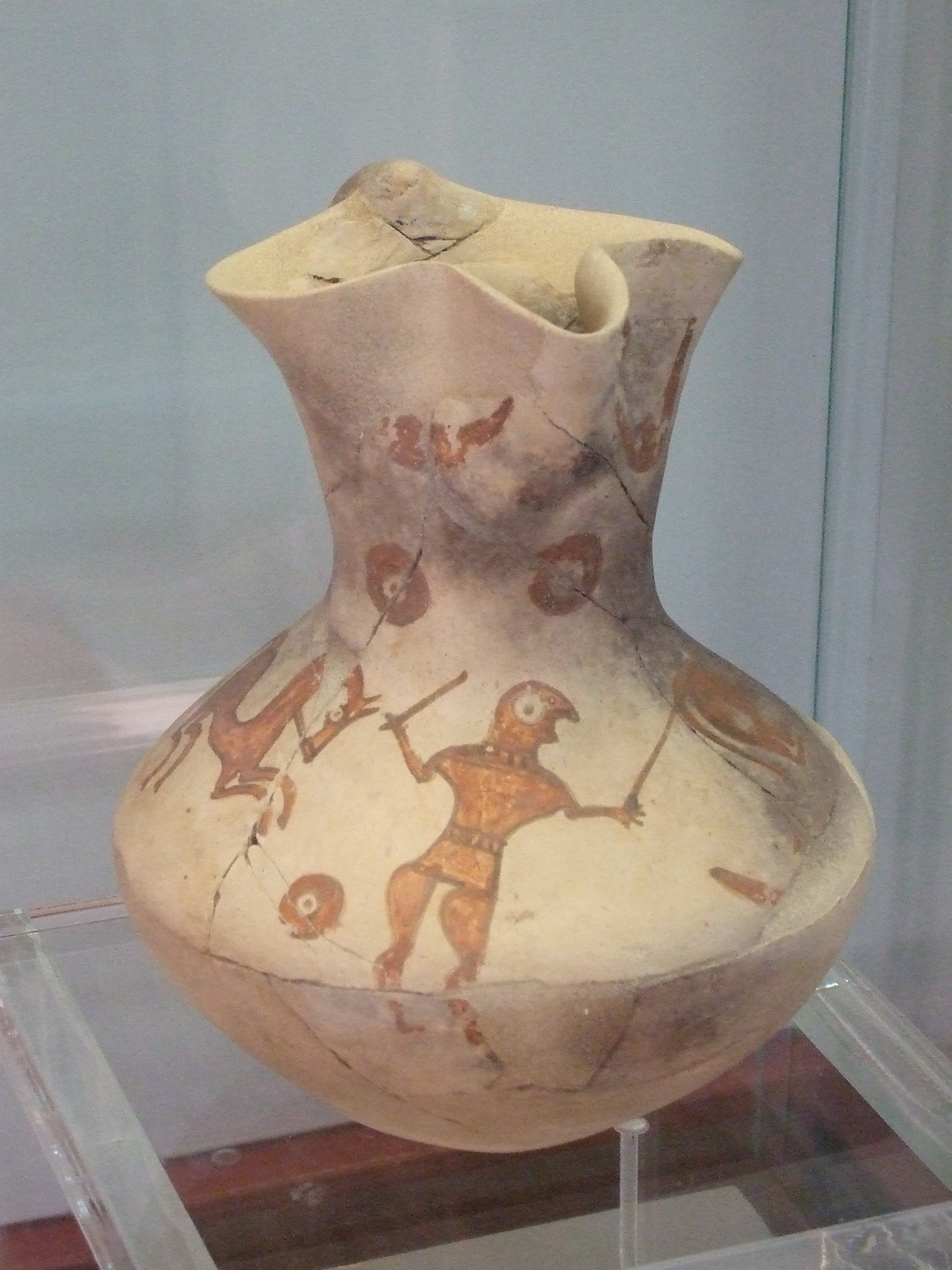 Jarra de boca trilobulada decorada con escena de doma; procedente de Numancia; s.I adC